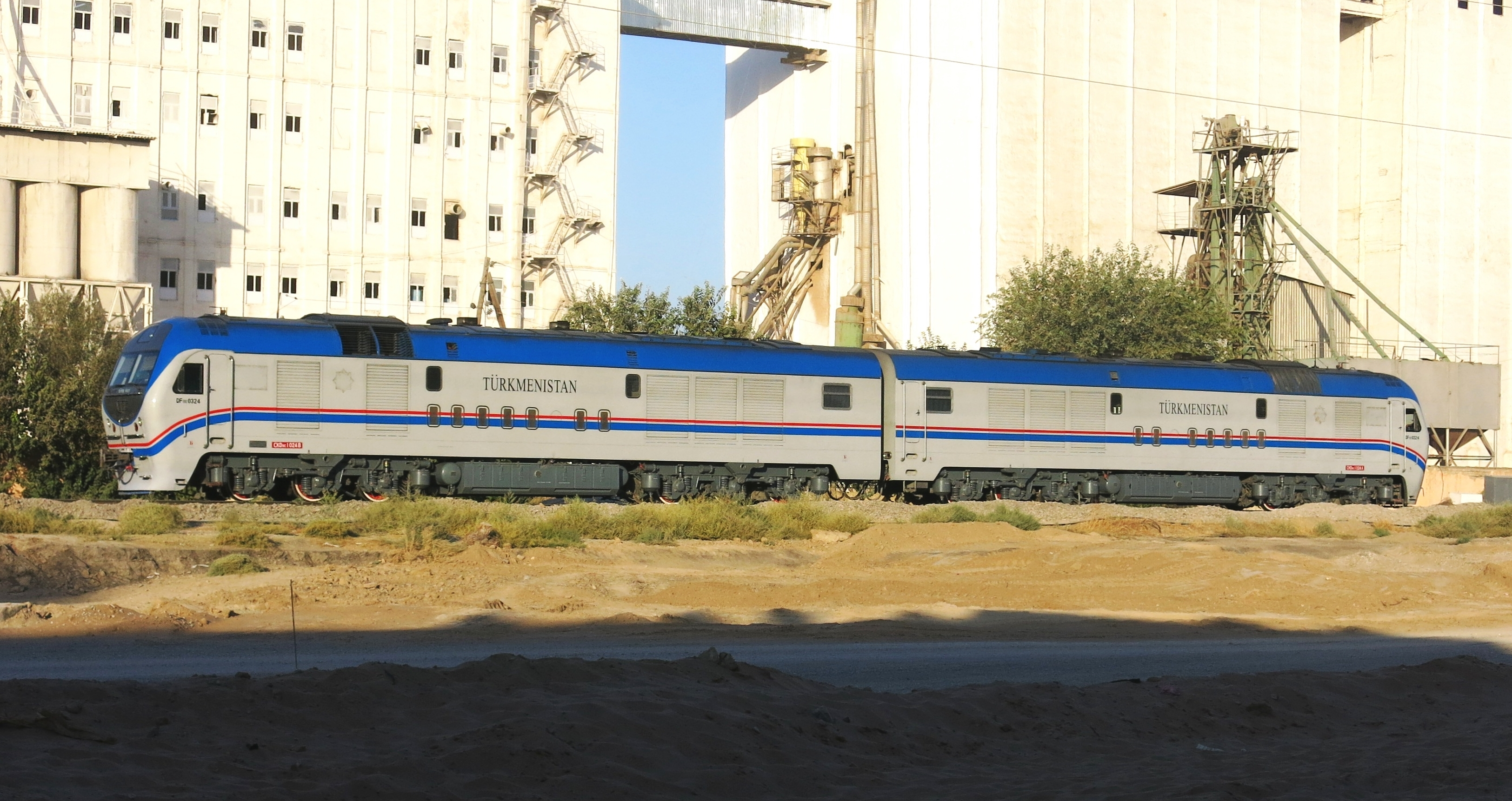 Lokzug der turkmenischen Eisenbahn passiert die staatliche Zementfabrik am nördlichen Stadtrand von Aschgabat